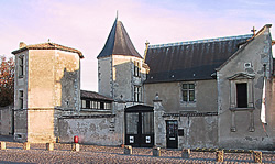 L'Hôtel de Clerjotte - Musée Ernest Cognacq - Saint-Martin-de-Ré - Île de Ré Photo issue de mon site